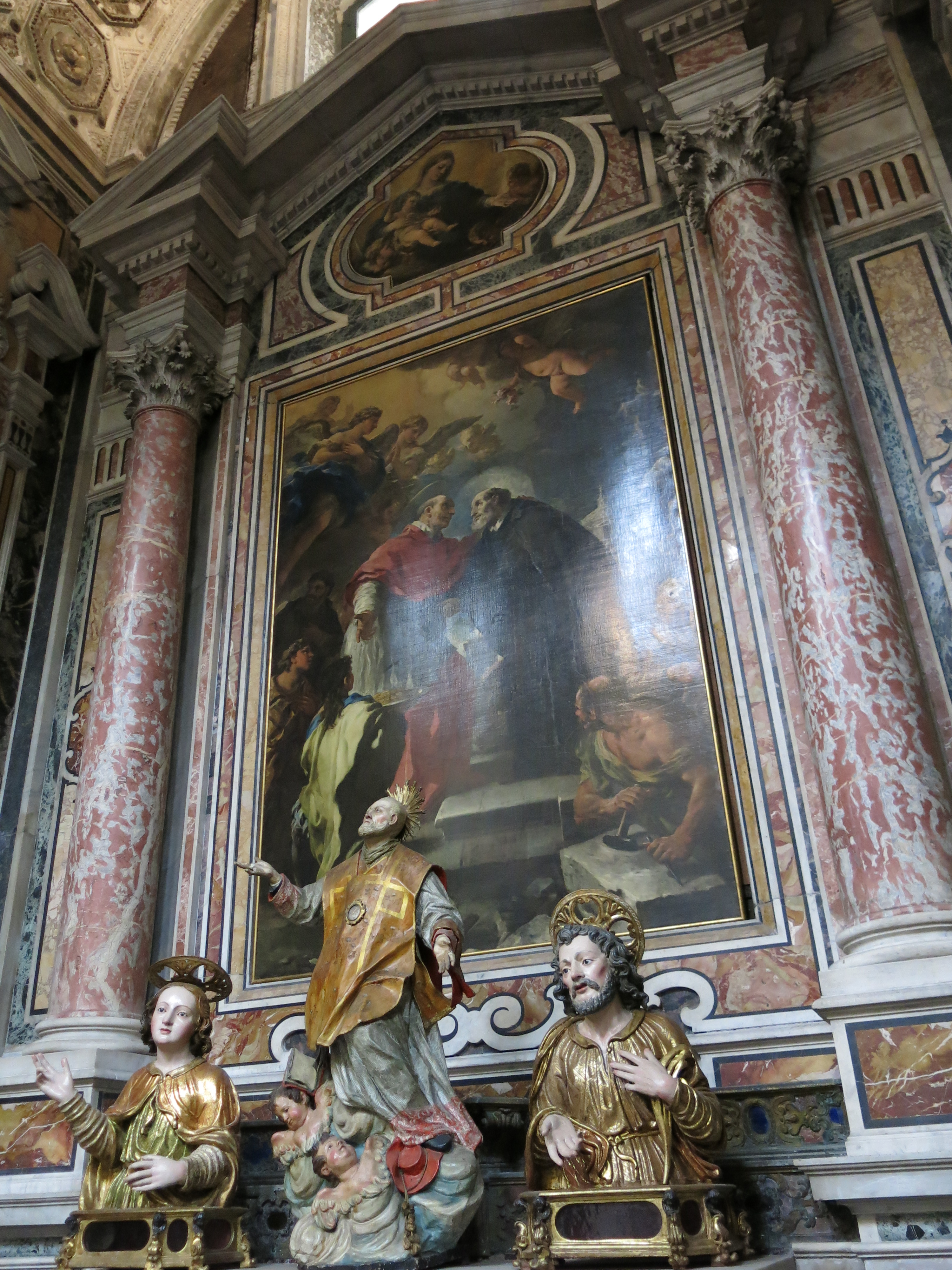 Le chiese di Napoli